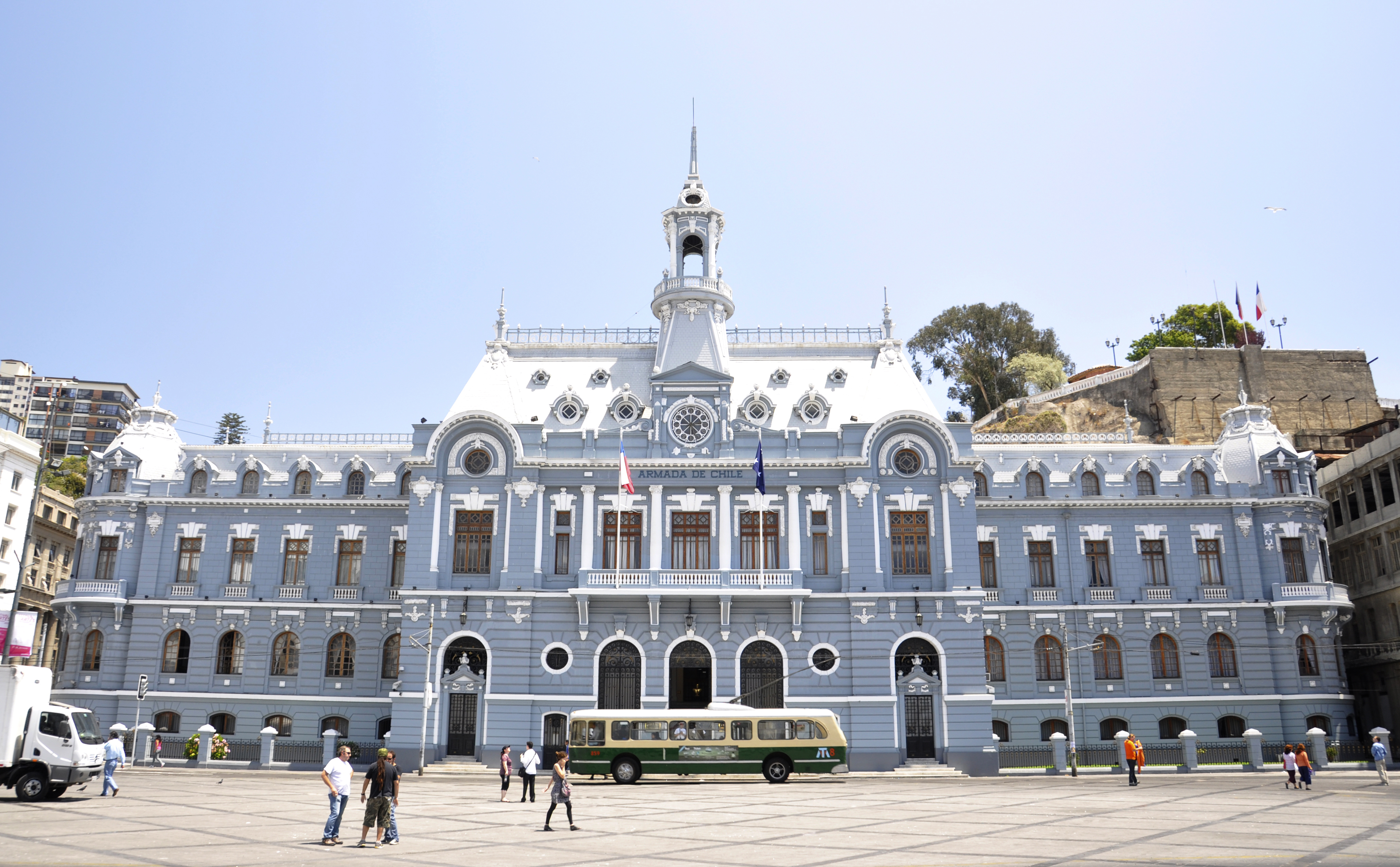 Antigua Intendencia de Valparaíso This is a photo of a national monument in Chile: 617